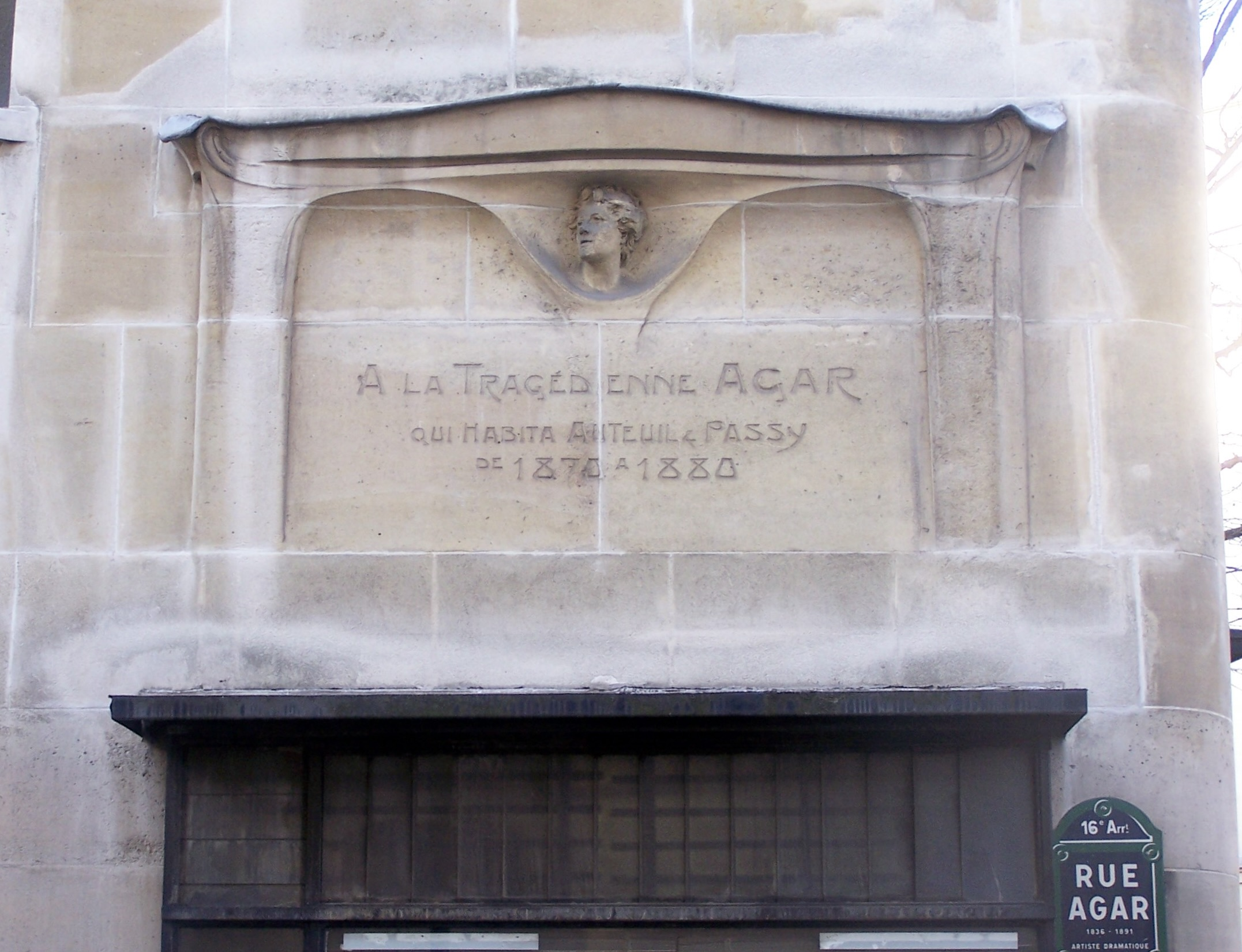 Hector Guimard : mémorial à la tragédienne Agar à l'entrée de la rue Agar à Paris 16ème, France